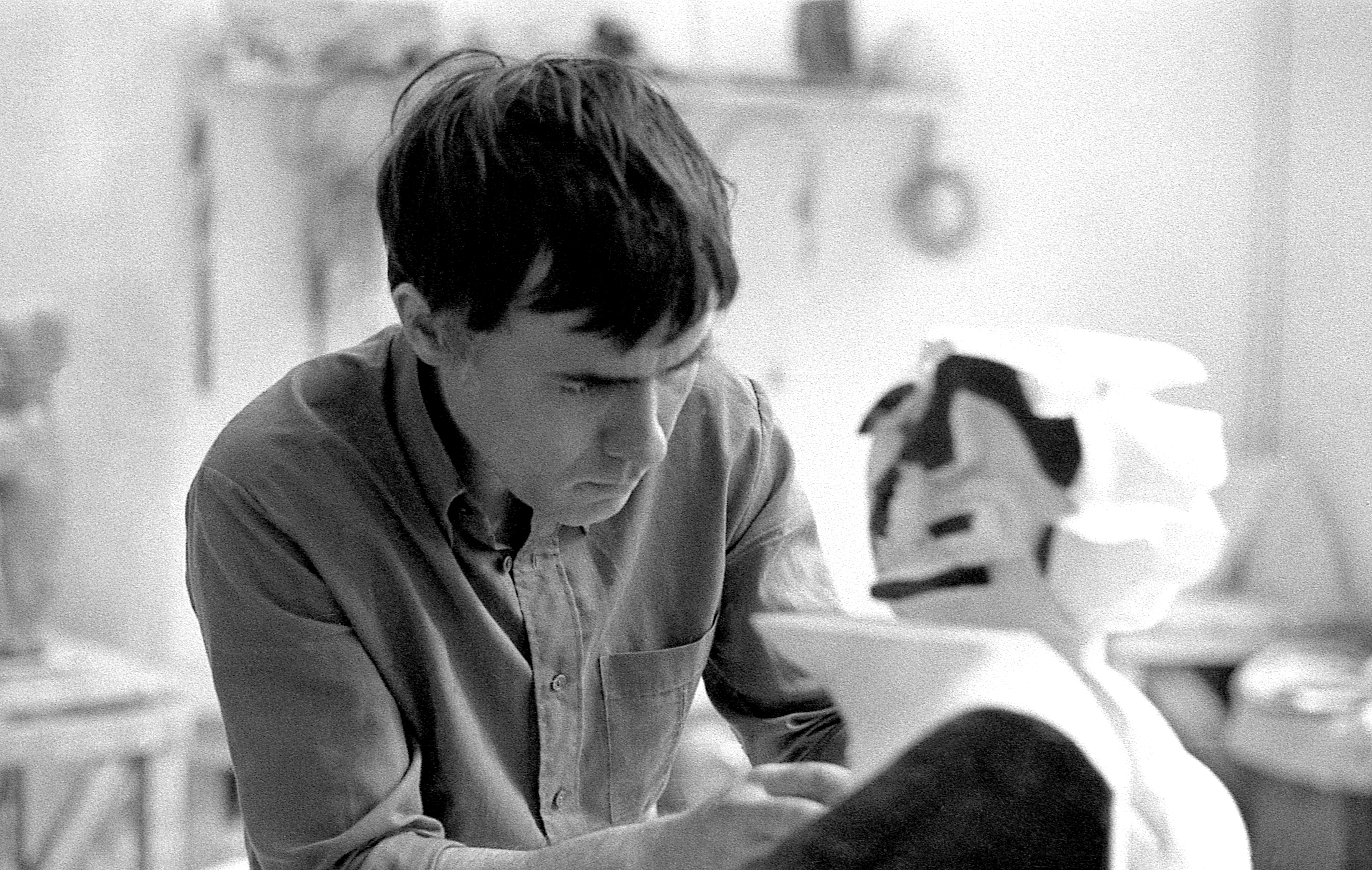 Bildhauer